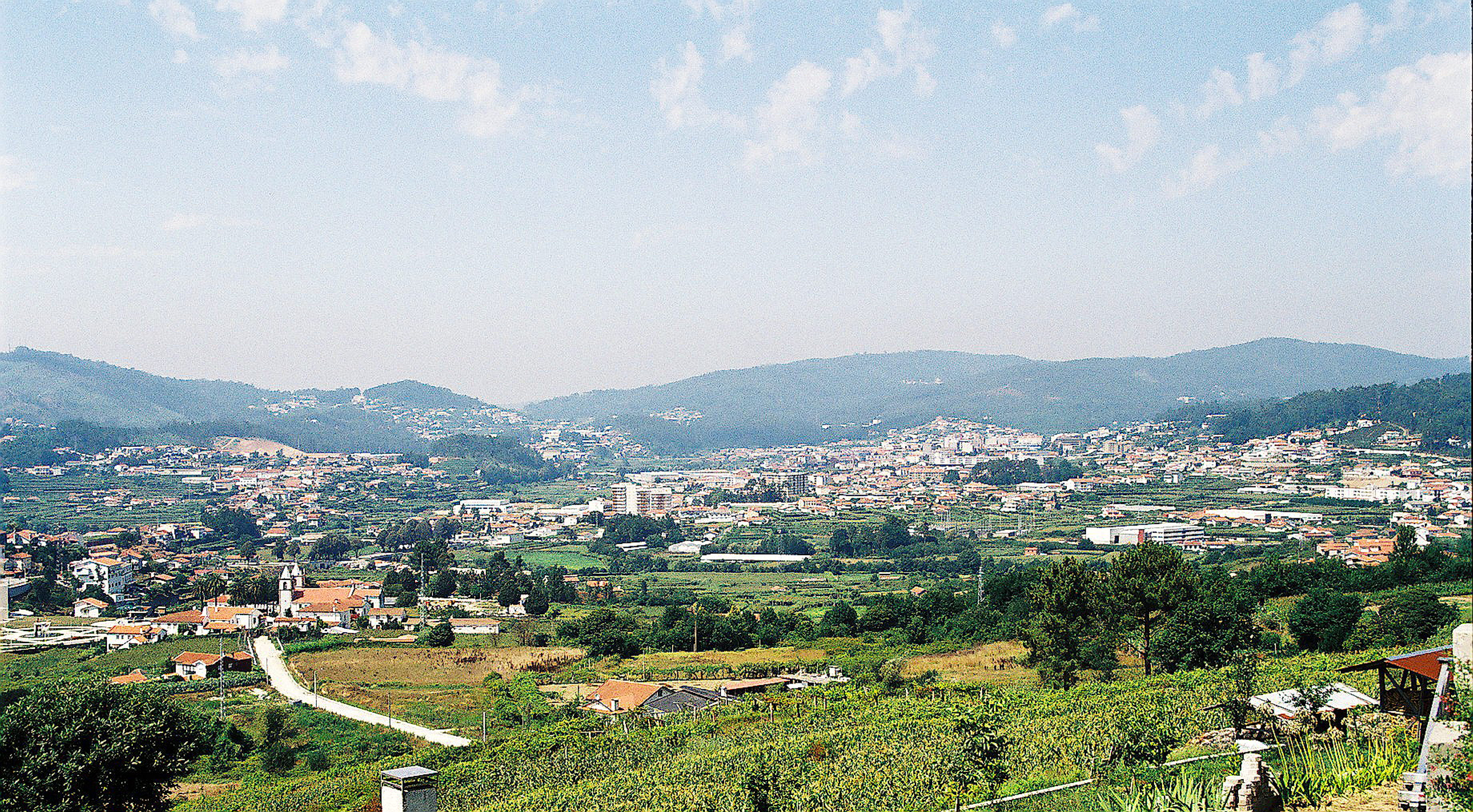 Vale de Cambra Fotografia de Vitor Oliveira, integrada na colecção com o endereço